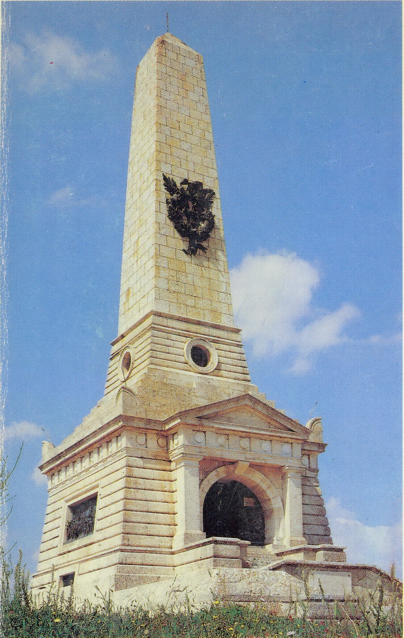 Foto dell'Ara monumentale di Pianto Romano (Calatafimi).